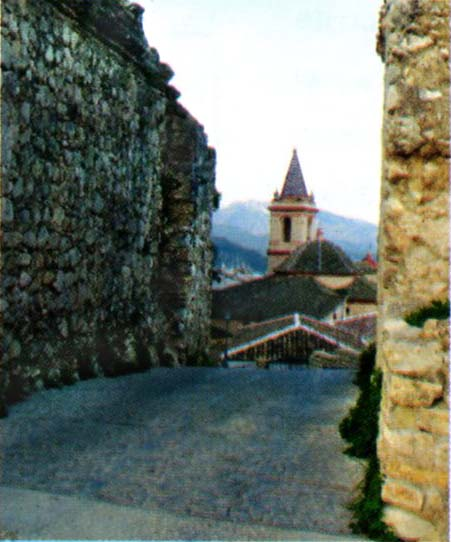 La Puerta de entrada a la Villa Medieval en su estado actual